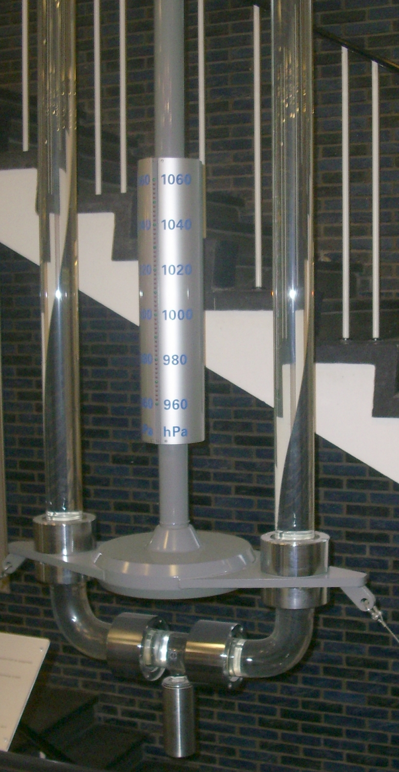 Watermanometer in het gebouw van de Faculteit Technische Natuurwetenschappen van de Technische Universiteit in Delf, afb. 4